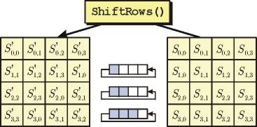 AES ShiftRows procedure